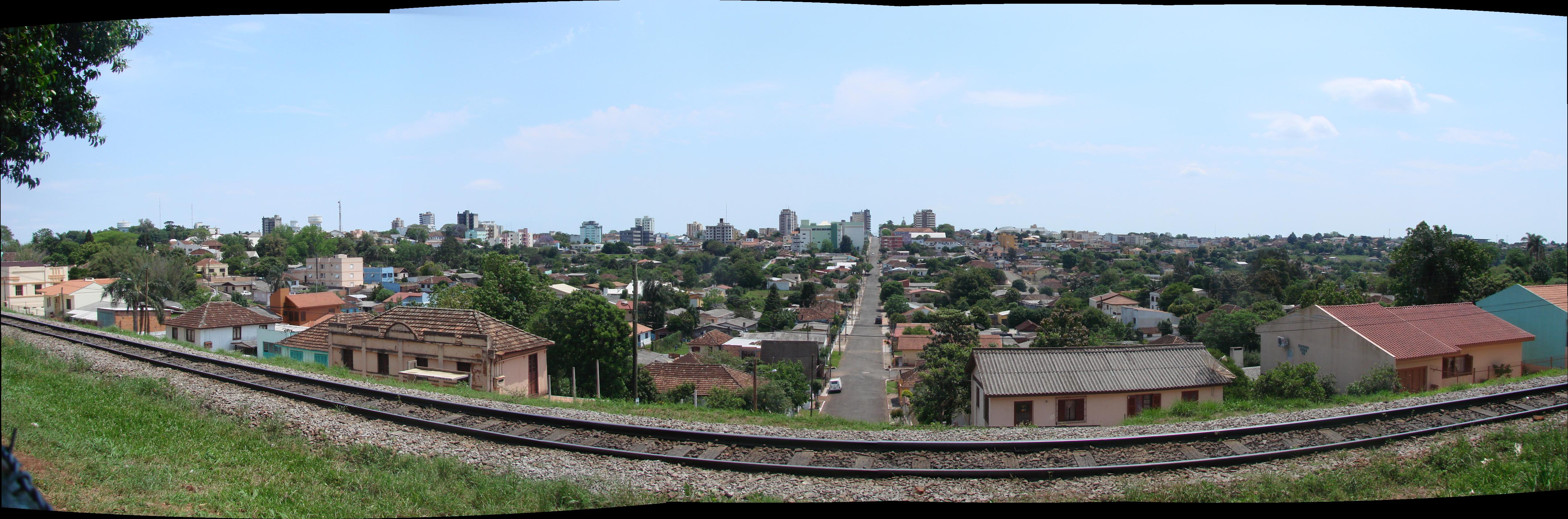 Panorama de Cruz Alta a partir do monumento de Nossa Senhora de Fátima